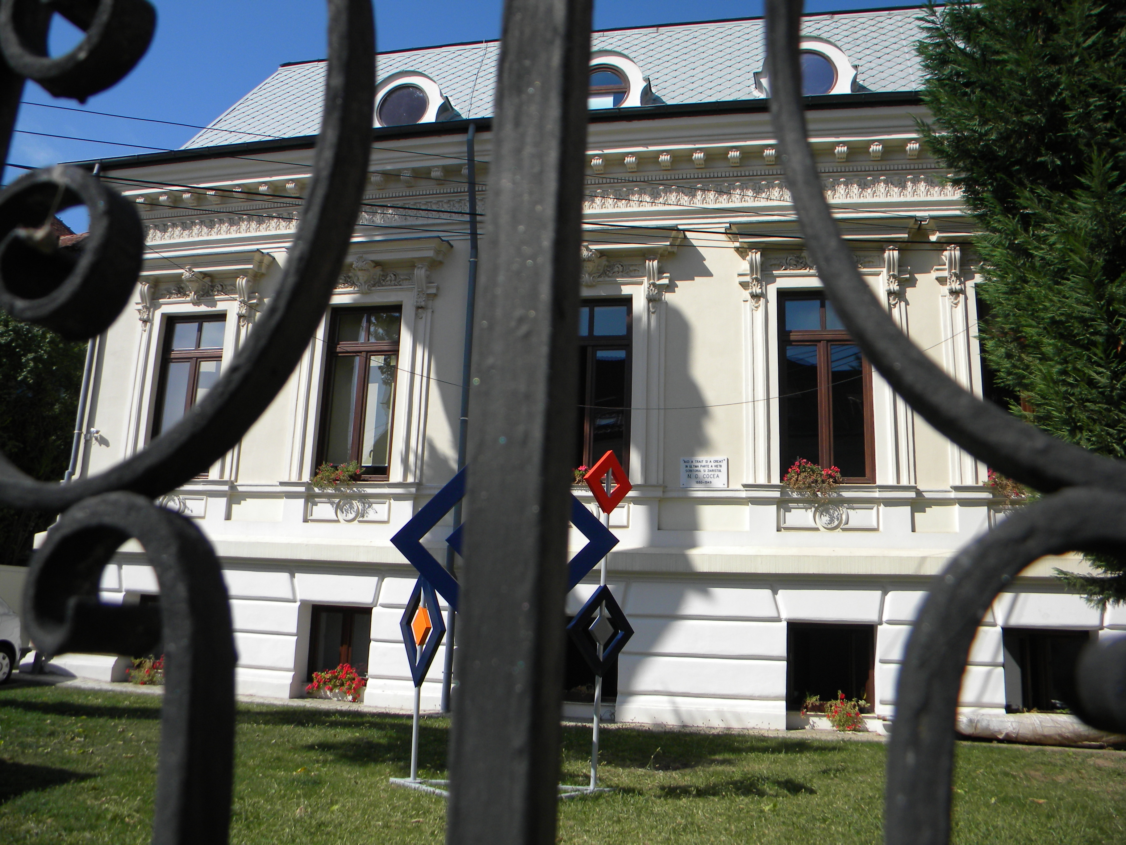 Bucuresti, Romania, Casa pe Str. Frumoasa nr. 39, sect. 1